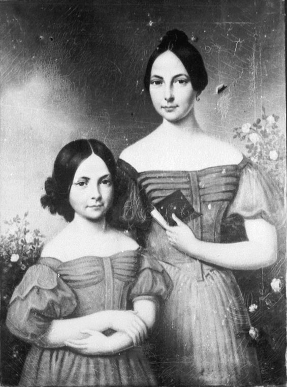 Prinzessinnen Auguste und Hermine zu Waldeck und Pyrmont